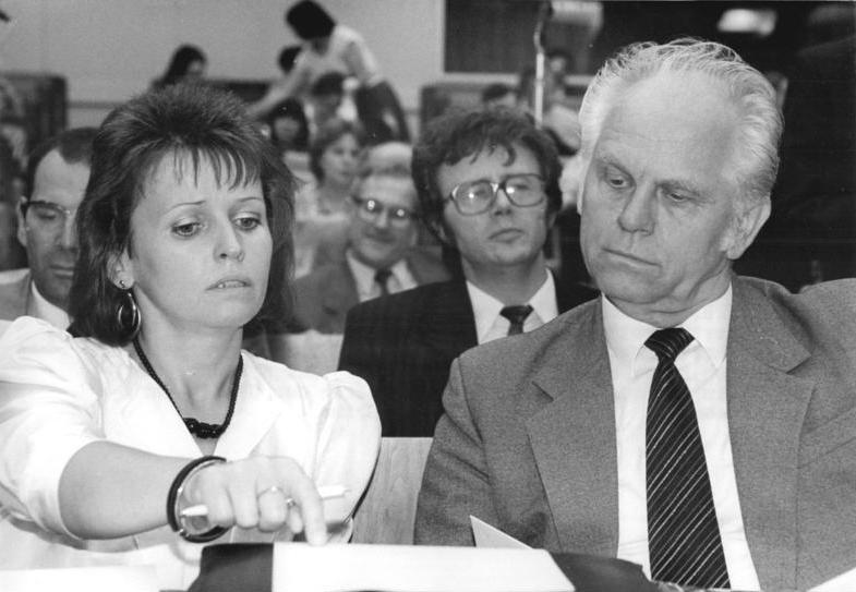 ADN-Peer Grimm 28.6.1990 Berlin: 18. VK-Tagung Die Abgeordneten debattierten weitere Gesetze und Verordnungen, die mit dem Inkrafttreten der Währungs,- Wirtschafts- und Sozialunion verbunden sind. Hier im Gespräch Dr. Günther Maleuda (DBD) und Karin Bencze, die einzige Vertreterin des DFD in der Volkskammer.